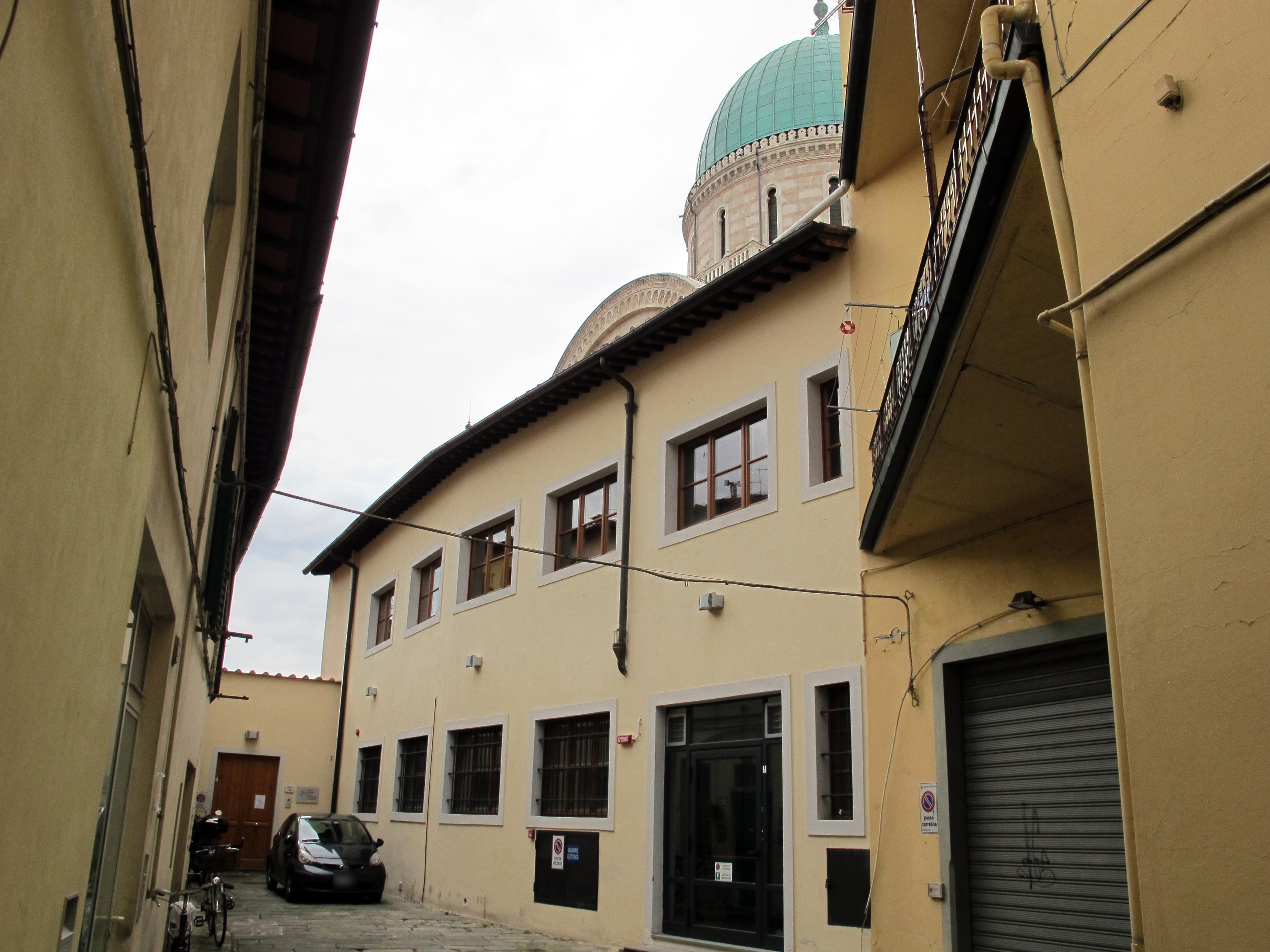 Via carducci 5, sede dell'istituto storico della resistenza in toscana